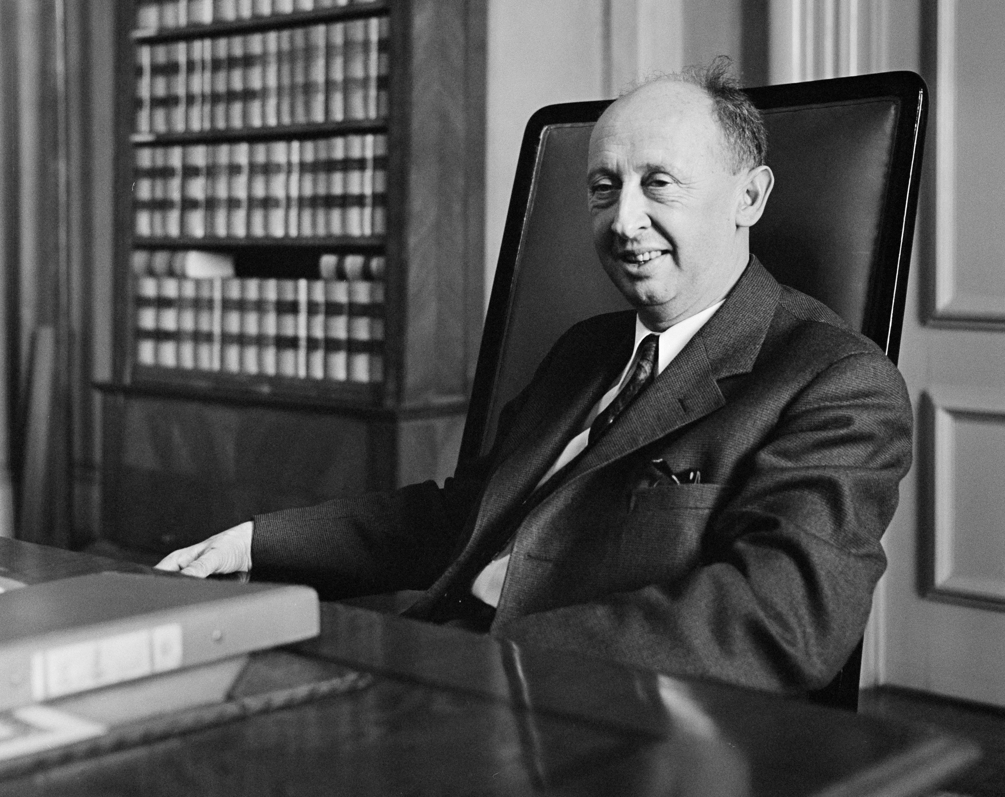 Stadshuset. Borgarrådet Hjalmar Mehr.